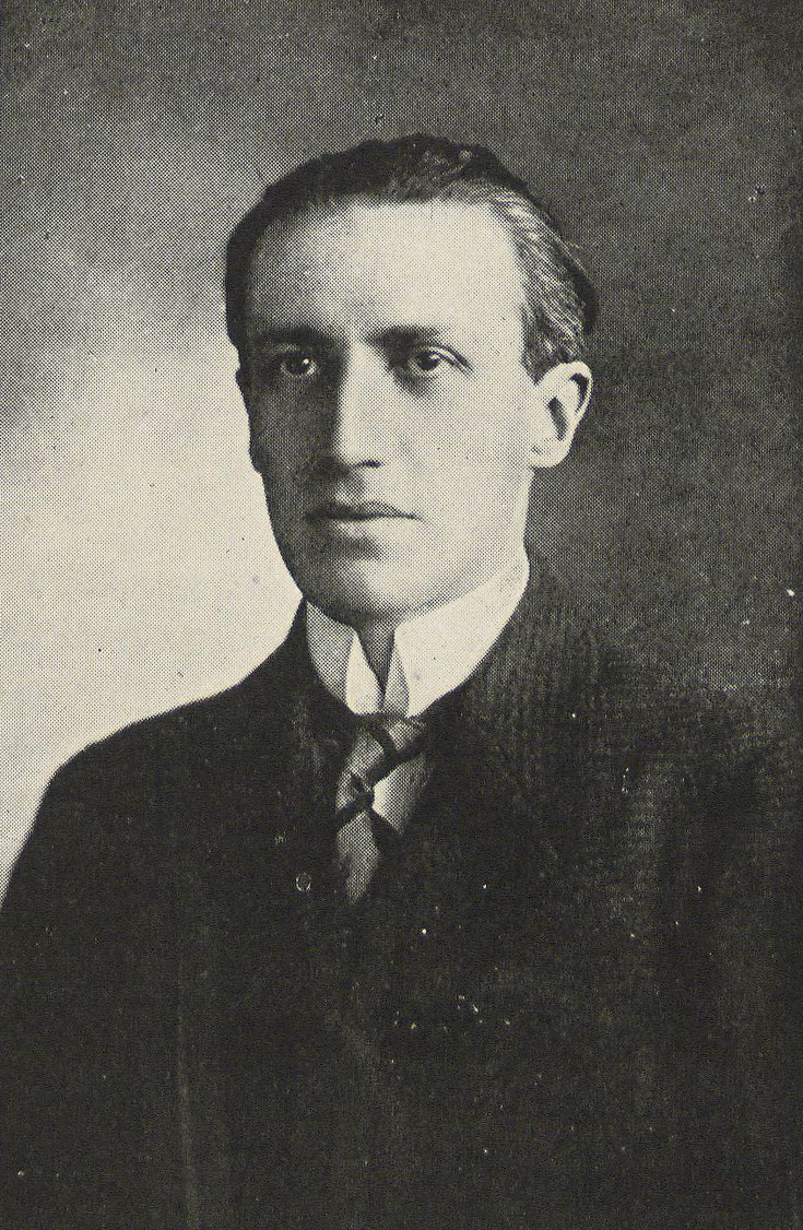 Manuel Rivas Vicuña, Nacido 1 de mayo de 1880, muere 4 de agosto de 1937 en Santiago de Chile. Político, diplomático y escritor chileno. De gran labor diplomática y tras muchos distintos cargos públicos. Escribió el libro Historia Política y Parlamentaria de Chile. 1891-1920. Creador de la Sociedad de Escuelas Nocturnas para Obreros en 1901.